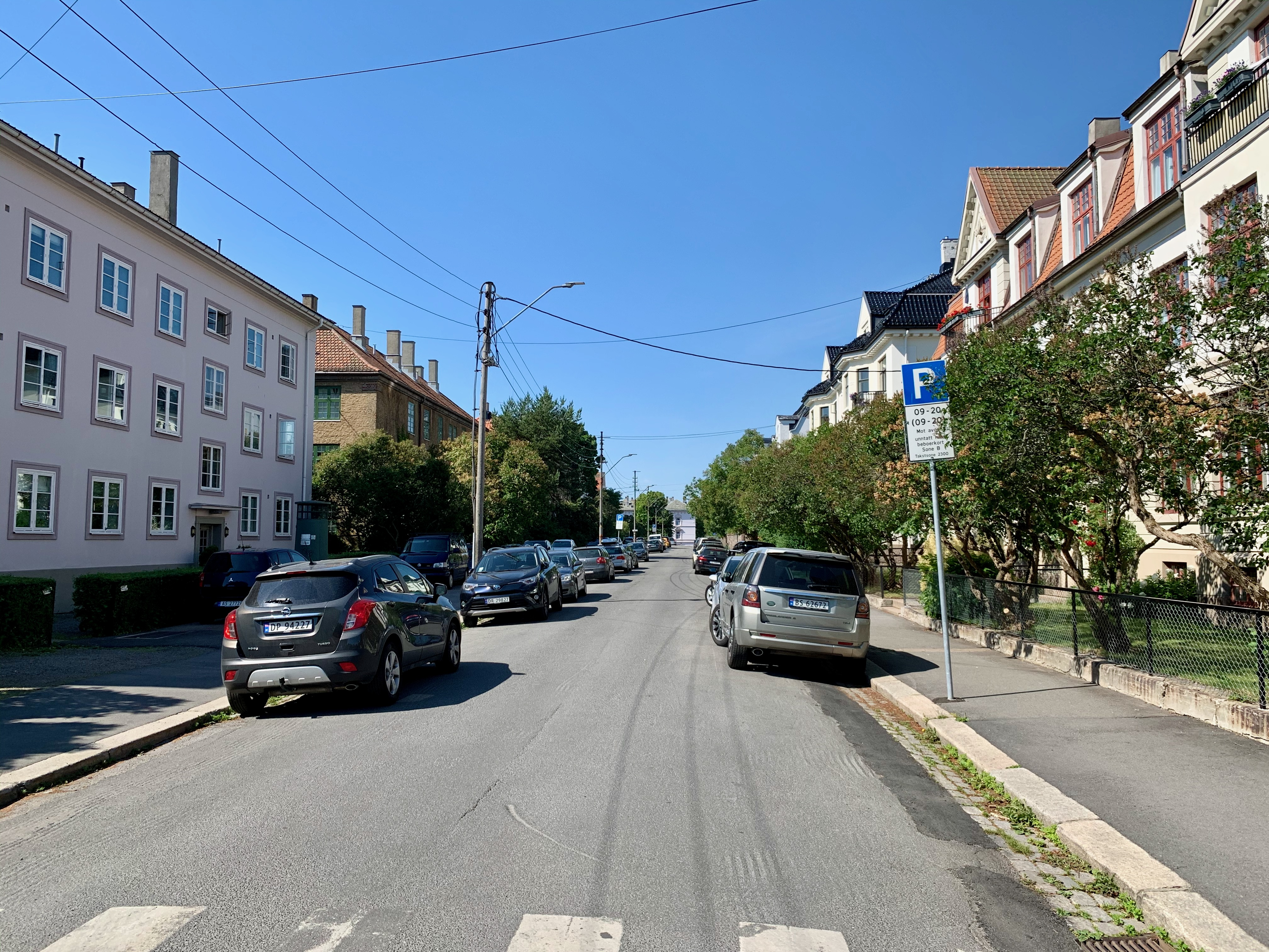 Anton Schjøths gate i Oslo